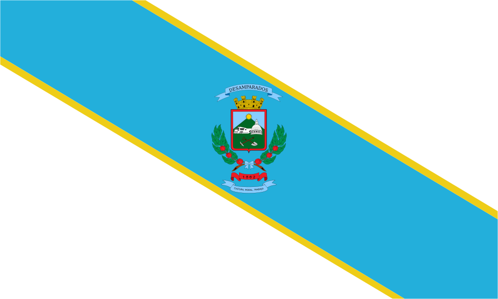 Bandera del Municipio de Desamparados, Costa Rica